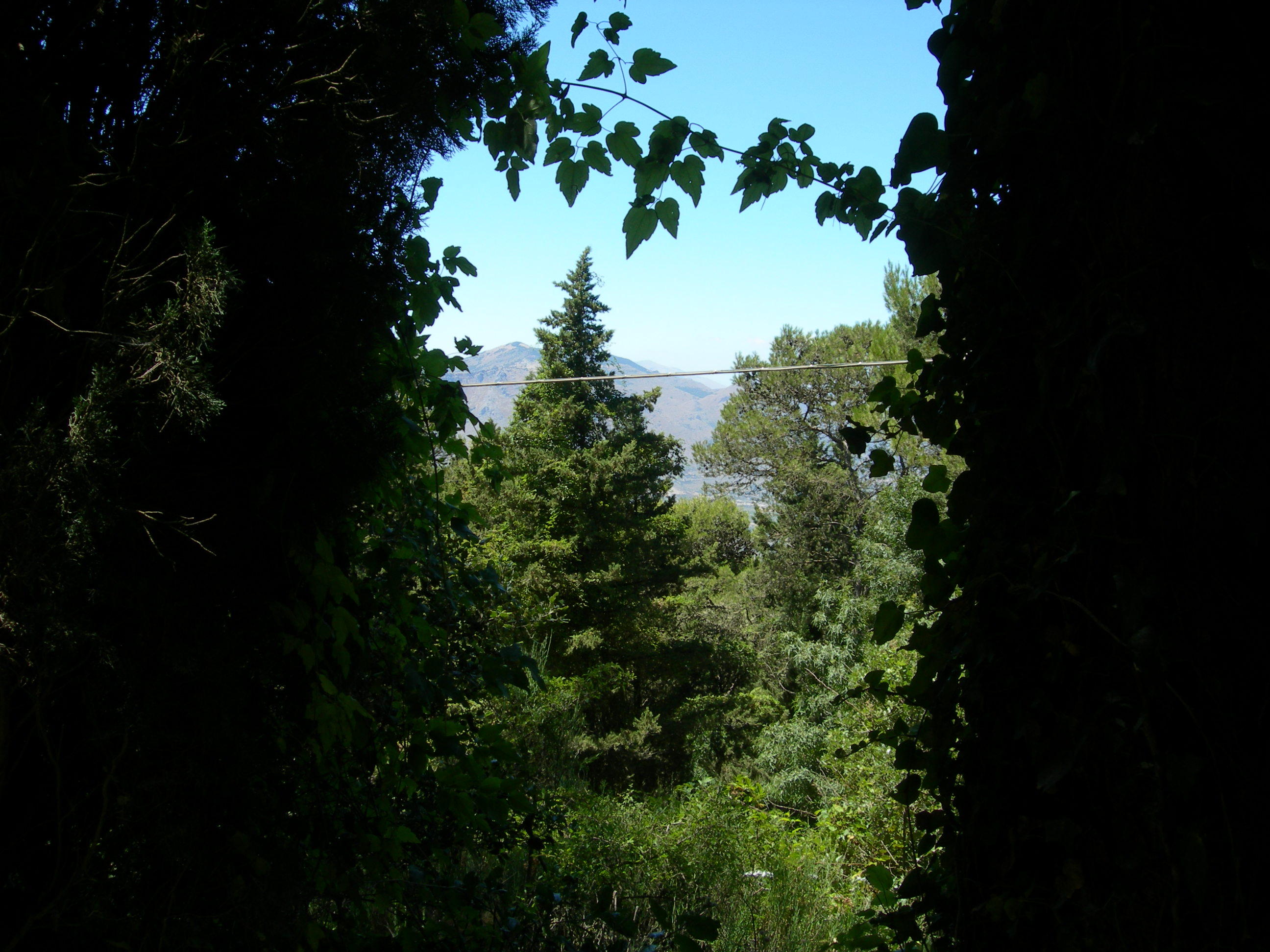 Riserva naturale Bosco di Alcamo